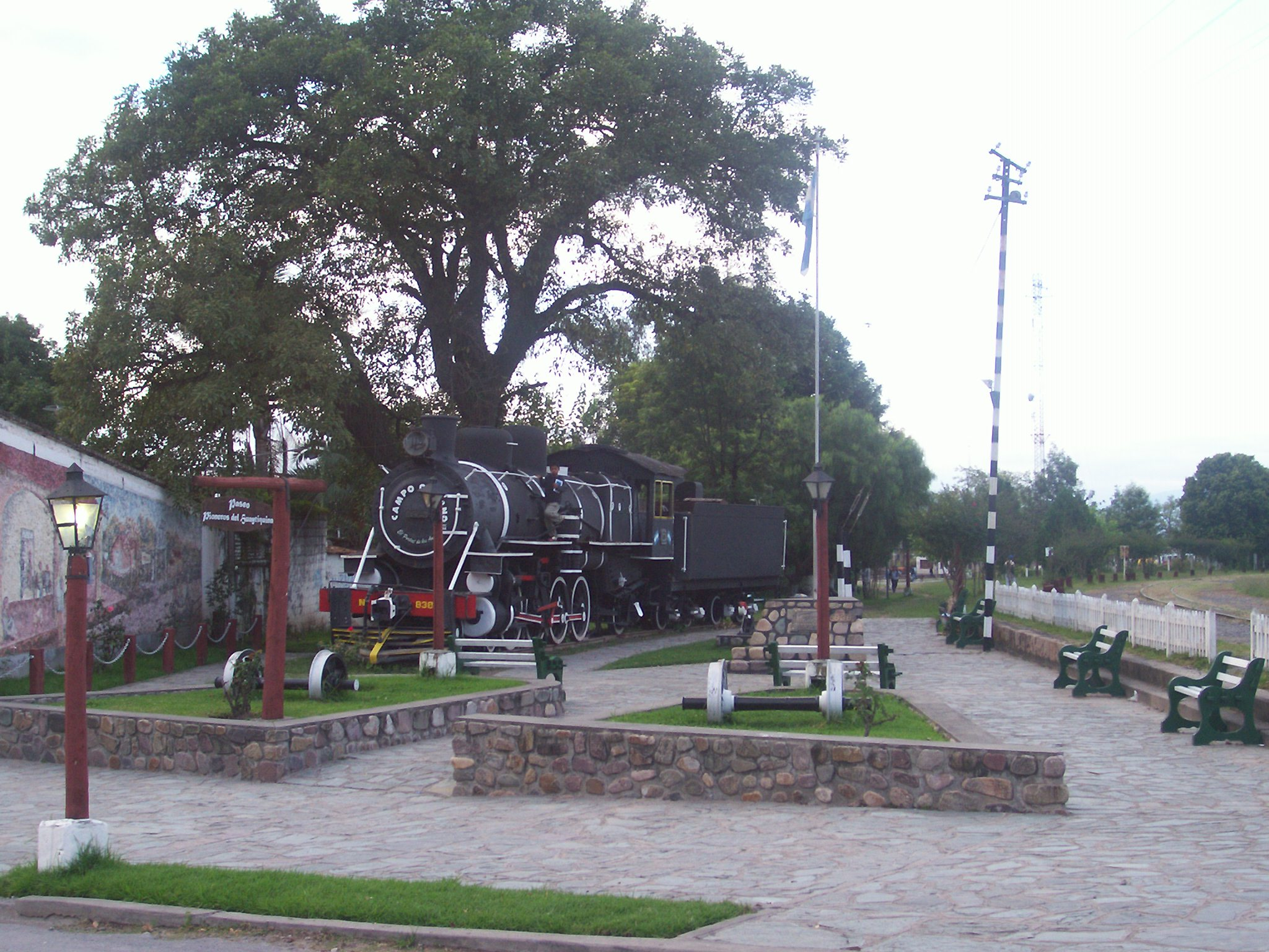 Antigua locomotora del Tren a las nubes, a un costado de la estacion de tren de Campo Quijano, Salta.